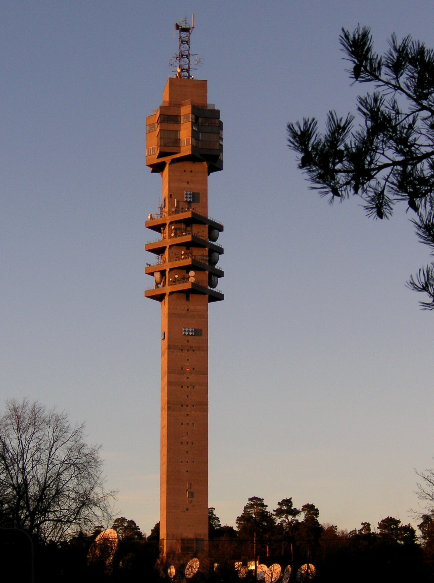 Kaknästornet